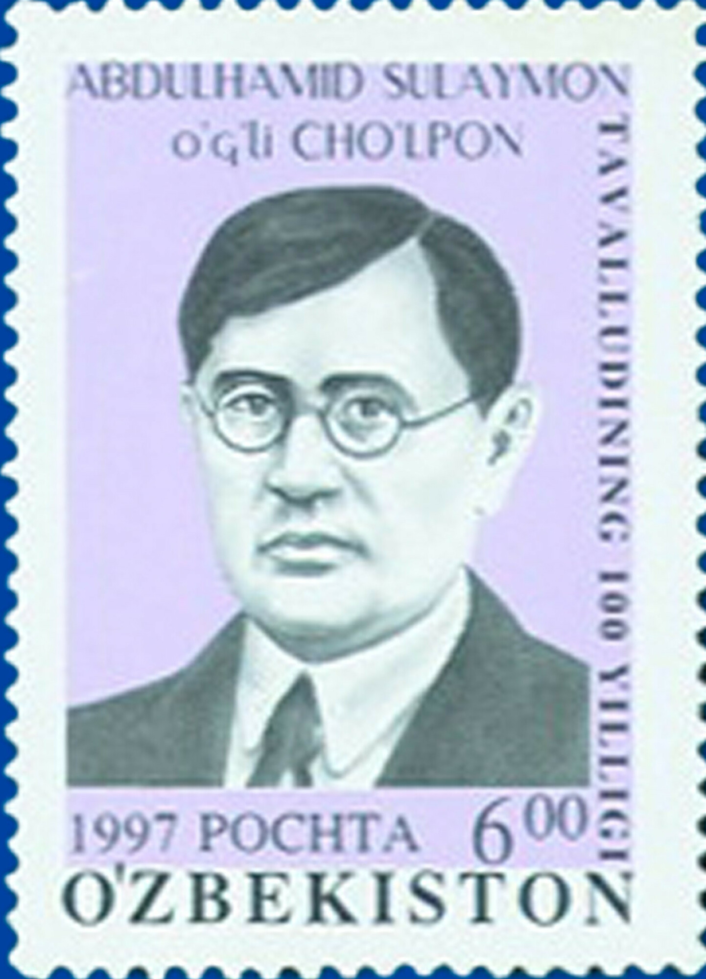 Abdulhamid Sulaymon Oʻgʻli (Choʻlpon)